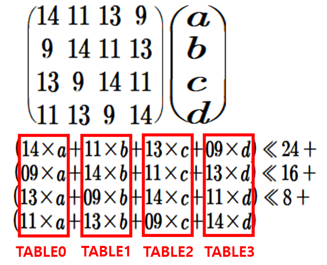 AES 복호화 시 사용하는 테이블